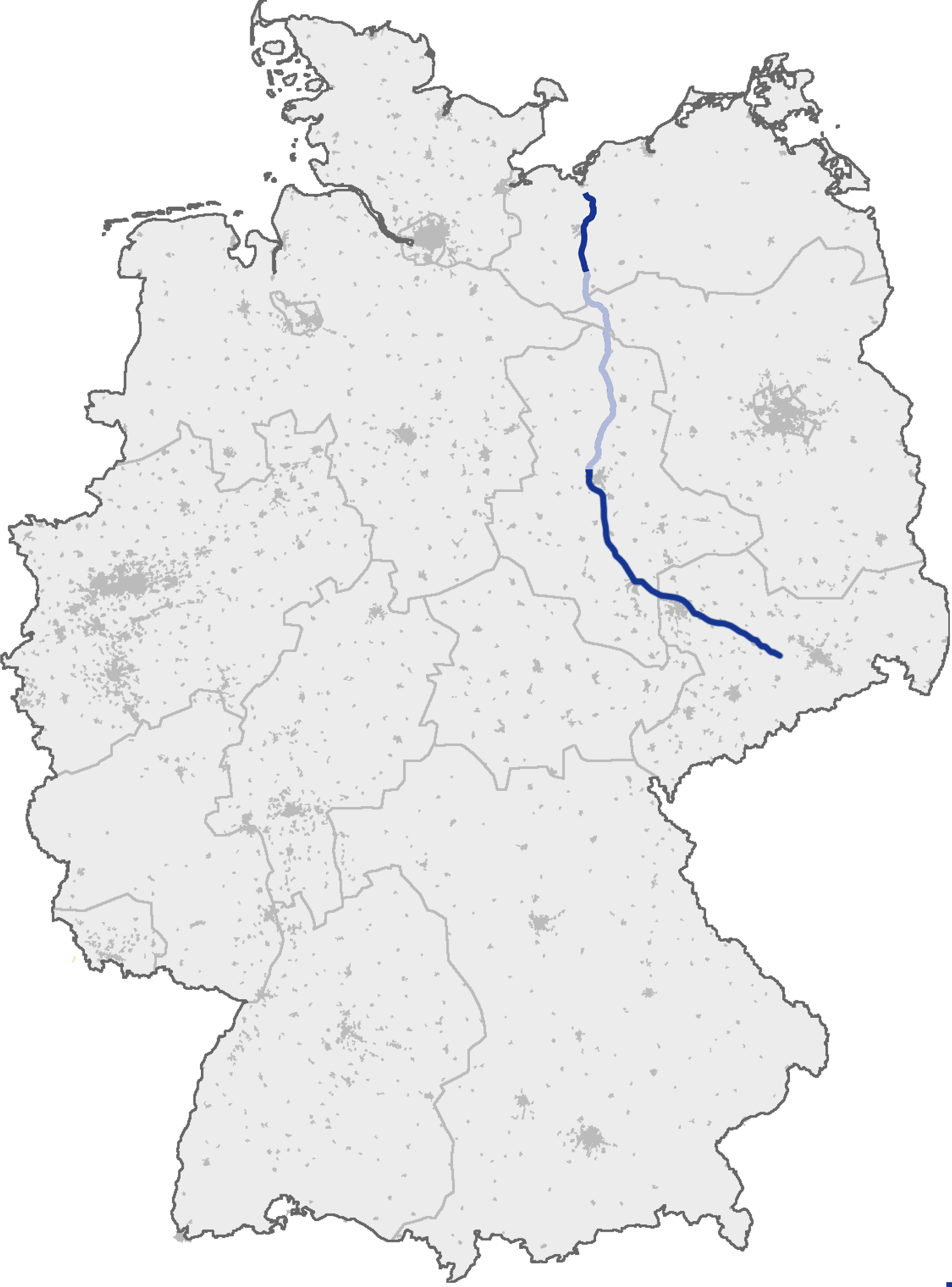 (Geplanter) Verlauf der Bundesautobahn A 14